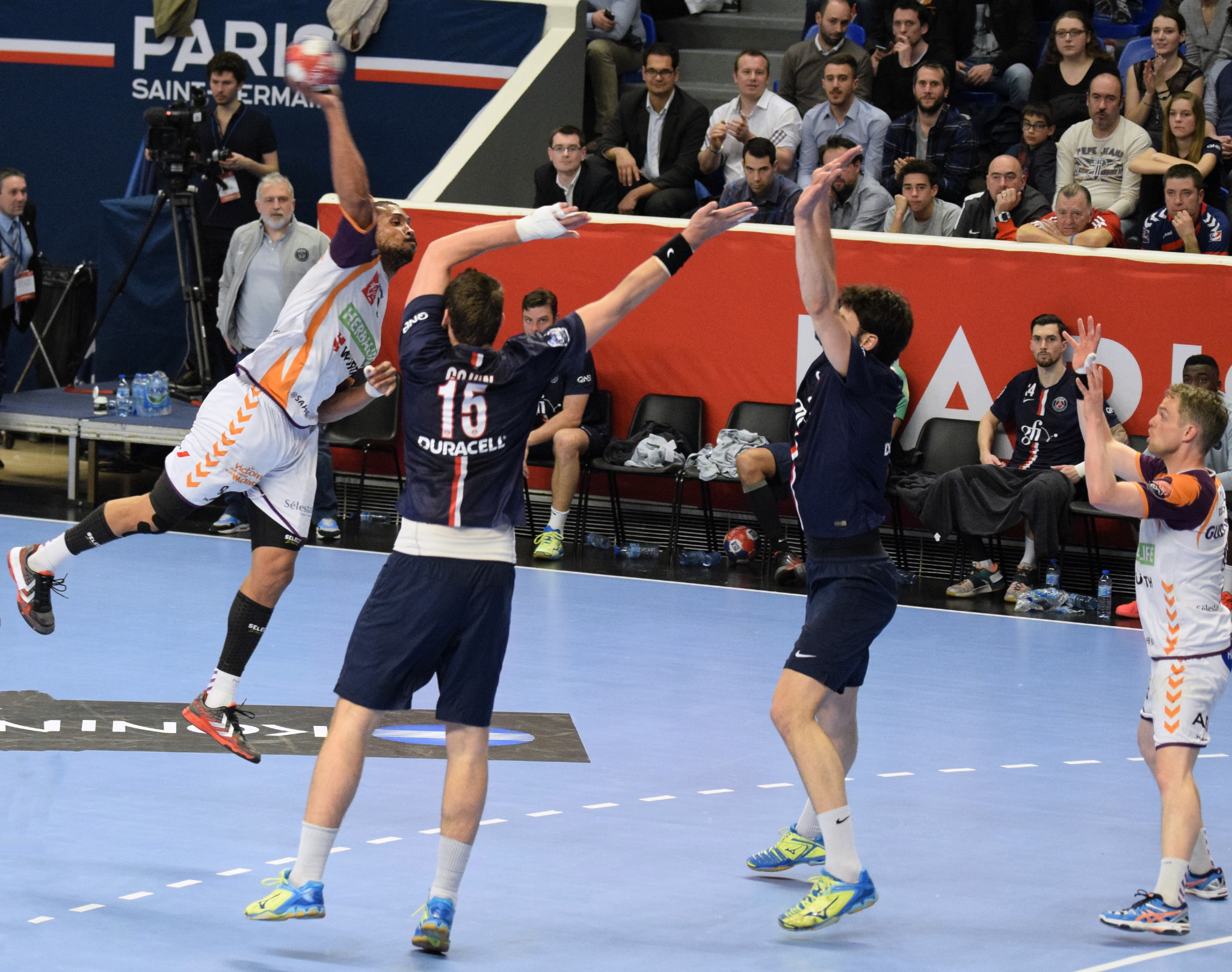 Rencontre de la 20e journée de LNh entre le PSG Handball et Sélestat. A Coubertin, le 08 avril 2015.